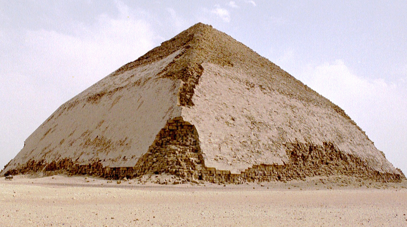 Bent Pyramid, Saqqara.